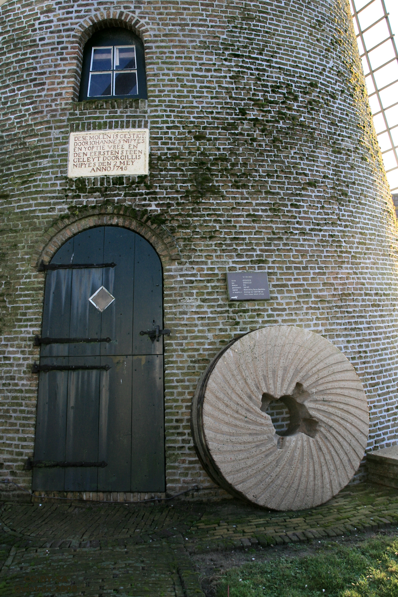 Stad aan 't Haringvliet, molen de Korenaar, entree met molensteen